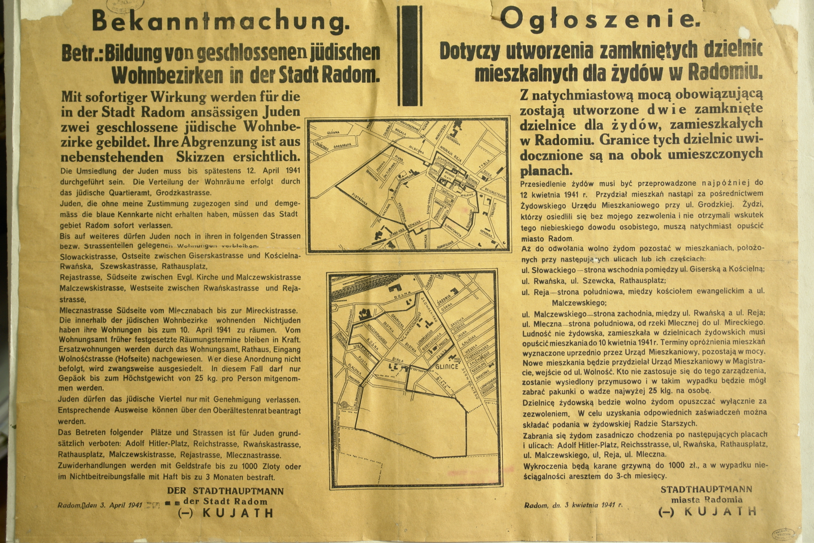 Bekanntmachung: Betr.: Bildung von geschlossenen jüdischen Wohnbezirken in der Stadt Radom. Mit sofortiger Wirkung werden für die in der Stadt Radom ansässigen Juden zwei geschlossene jüdische Wohnbezirke gebildet. Ihre Abgrenzung ist aus nebenstehenden Skizzen ersichtlich. Die Umsiedlung muß bis spätestens 12. April 1941 durchgeführt sein...